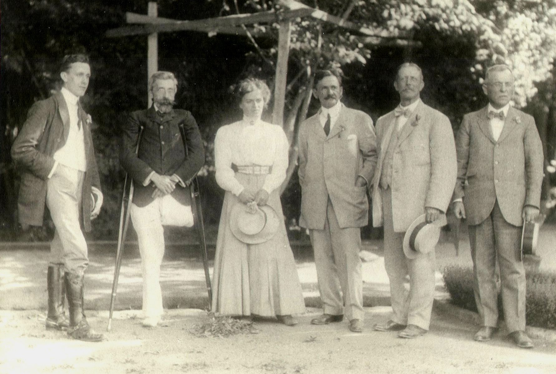 Visita de A. A. Michelson a Carlos Newman y señora en la Finka Andonaegui, Quillota, con Arturo Salazar y otros